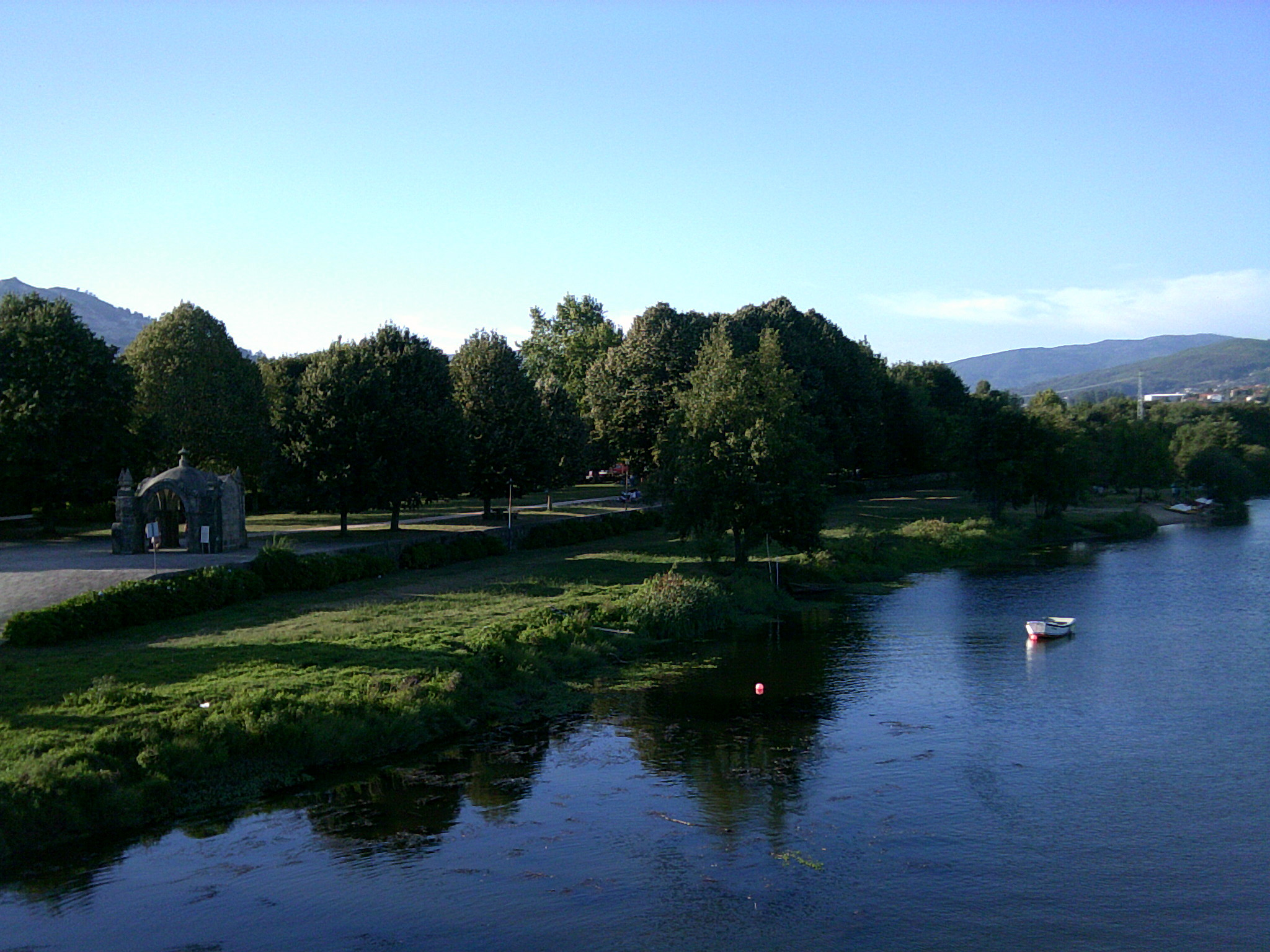 Rio Lima e Capela do Anjo da Guarda, freguesia de Ponte de Lima, vila de mesmo nome, distrito de Viana do Castelo, Portugal.